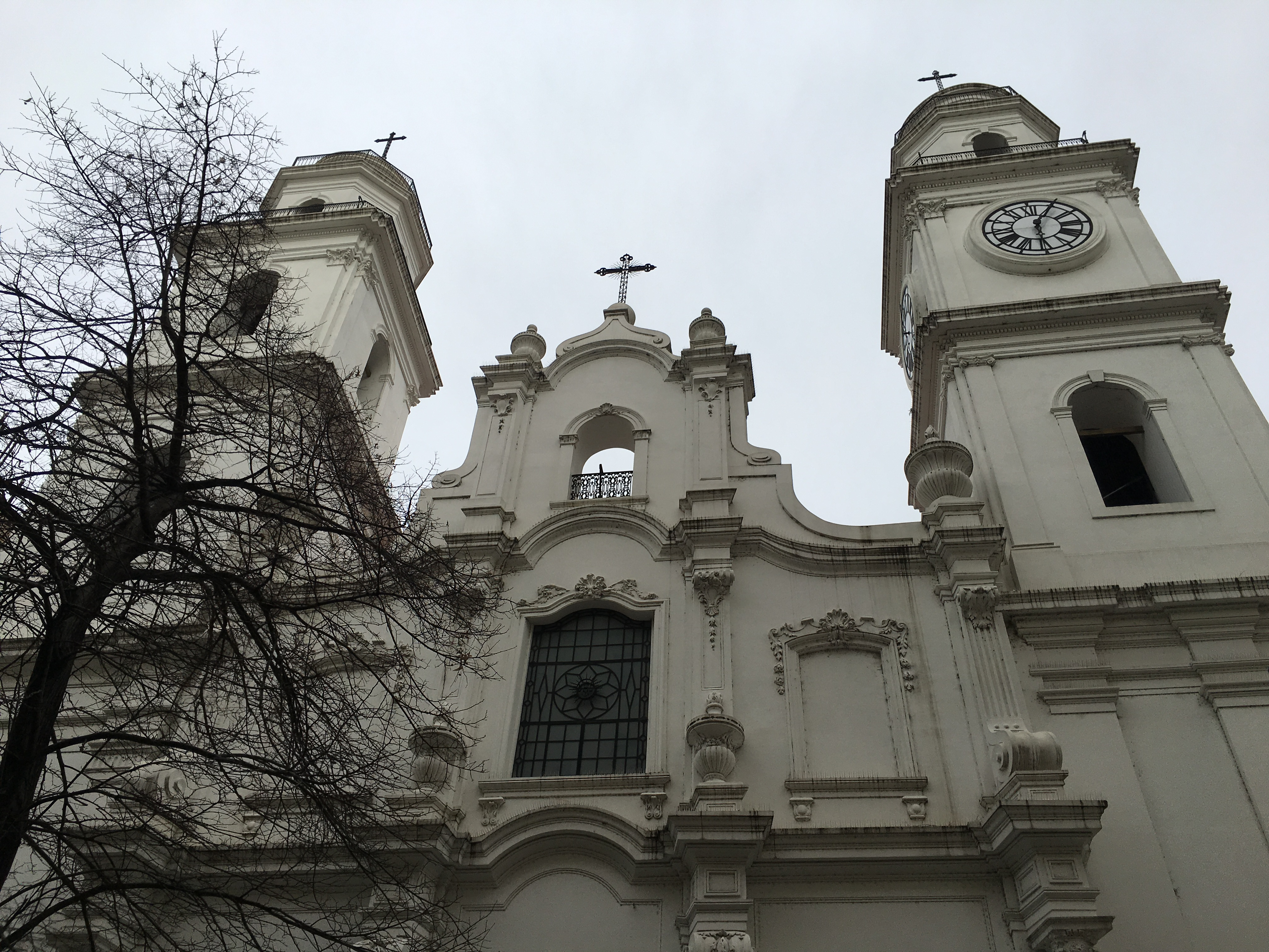 Fachada superior de la Iglesia de San Ignacio en Montserrat, Buenos Aires, Argentina.